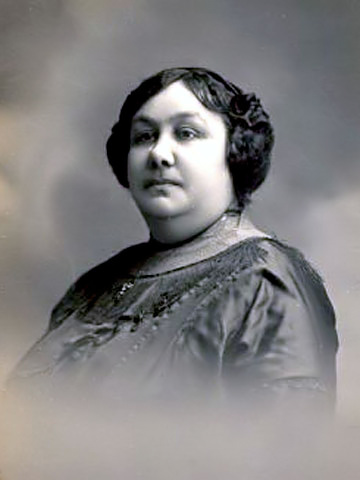 Adelaide de Jesus Damas Brazão Cabete (1867 — 1935), foi uma das principais feministas portuguesas do século XX. Republicana convicta, foi médica obstetra, ginecologista, professora, maçom, publicista, benemérita, pacifista, abolicionista, defensora dos animais e humanista.